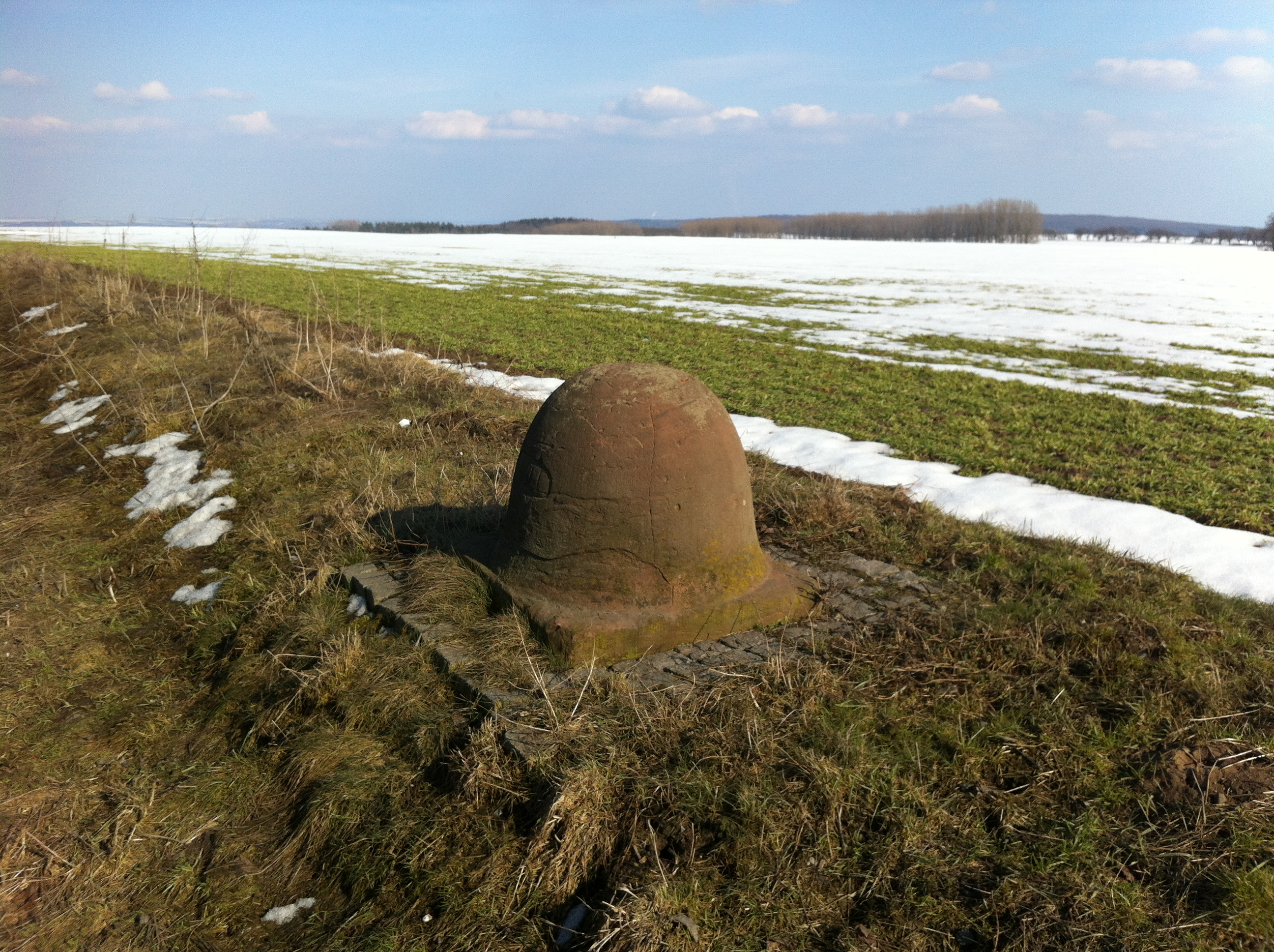 Preußischer Viertelmeilenstein von 1826 an der Bundesstraße 80 nahe Blankenheim. Früher verlief hier die Kunststraße von Langenbogen über Eisleben und Sangerghausen nach Nordhausen.